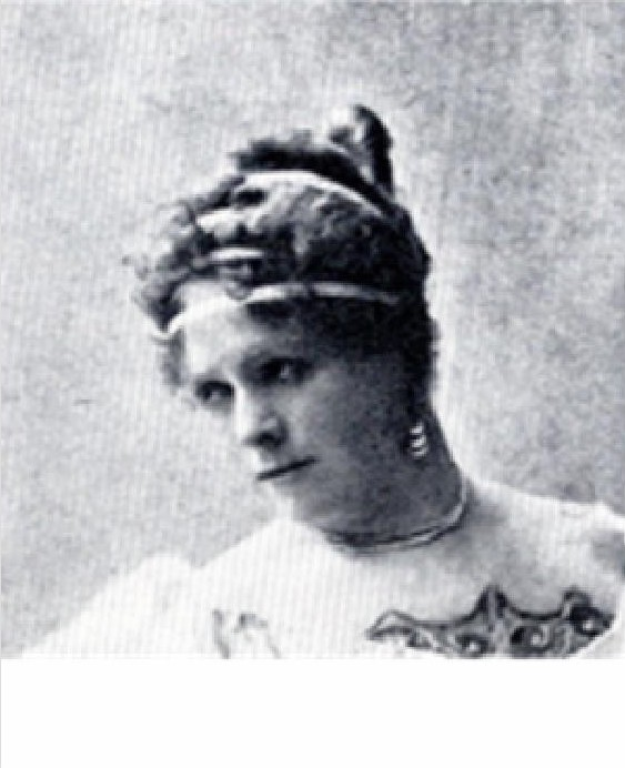 Vojtová Hana, česká herečka.